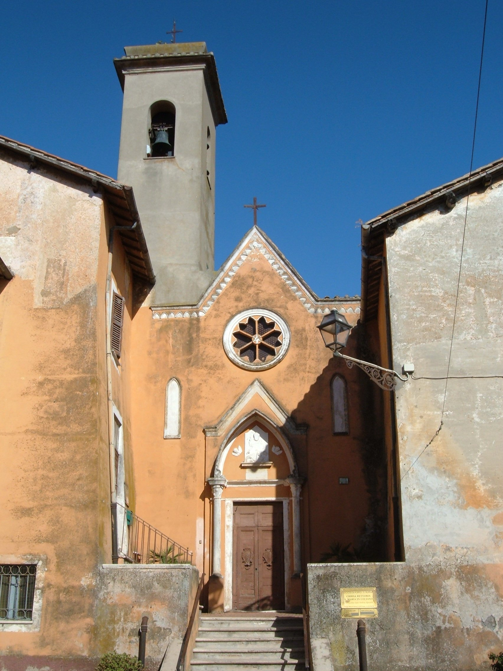 La chiesa di Santa Maria in Celsano, nella casale Celsano (zona Santa Maria di Galeria), nell'agro romano.